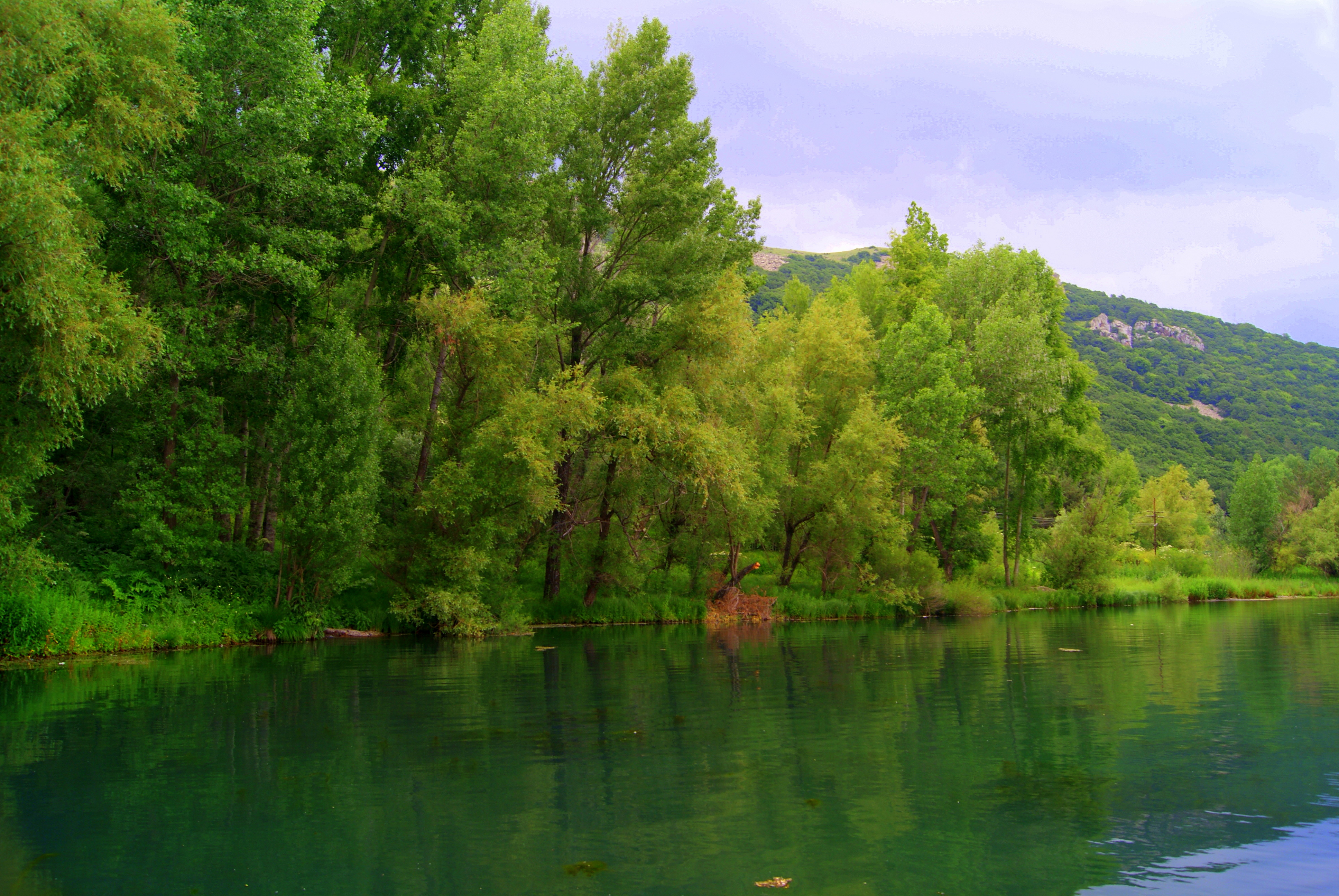 Ջերմուկի ջրաբանական արգելավայր